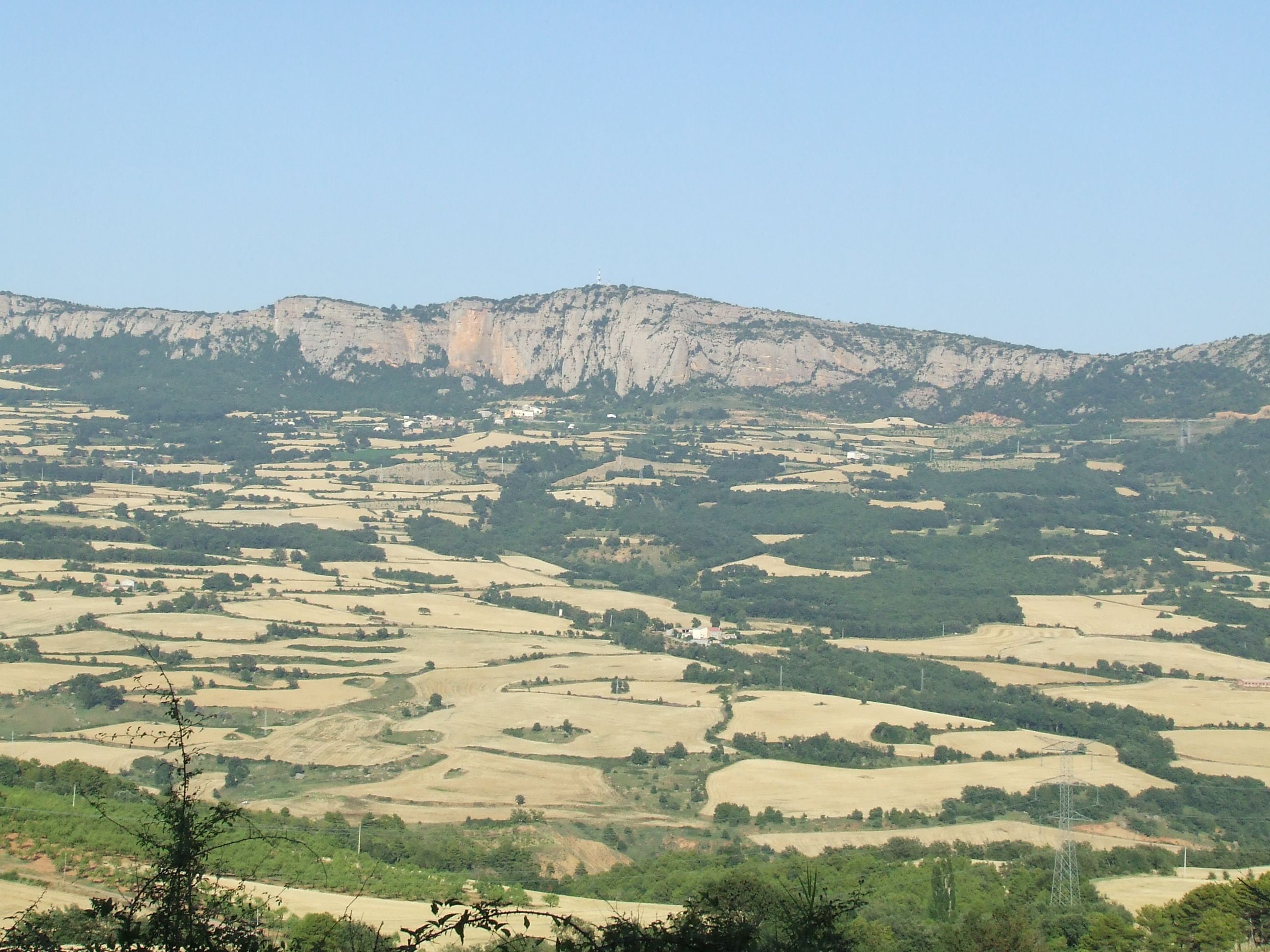 El Roc de Benavent i el terme de Benavent de Tremp (Benavent de la Conca, Isona i Conca Dellà, Pallars Jussà)